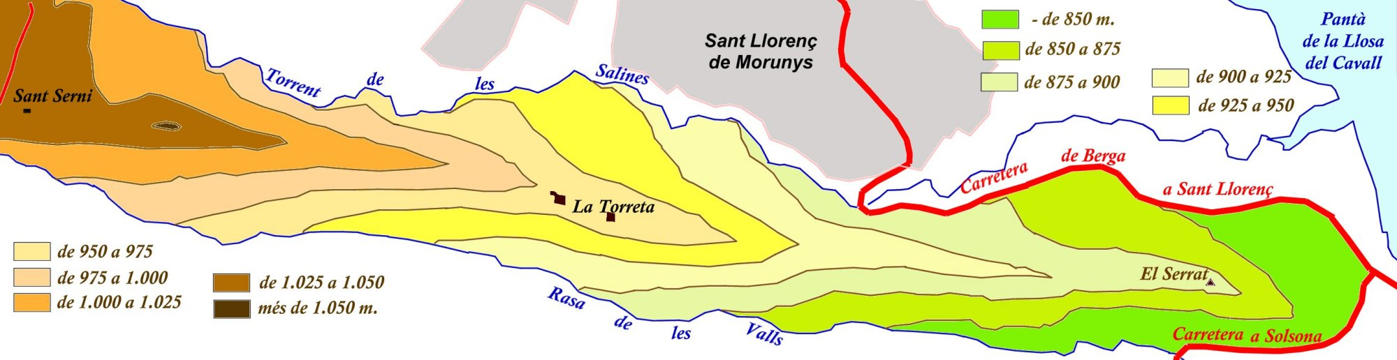 Mapa orogràfic del Serrat de la Creueta, a la Vall de Lord (municipi de Sant Llorenç de Morunys, comarca del Solsonès)